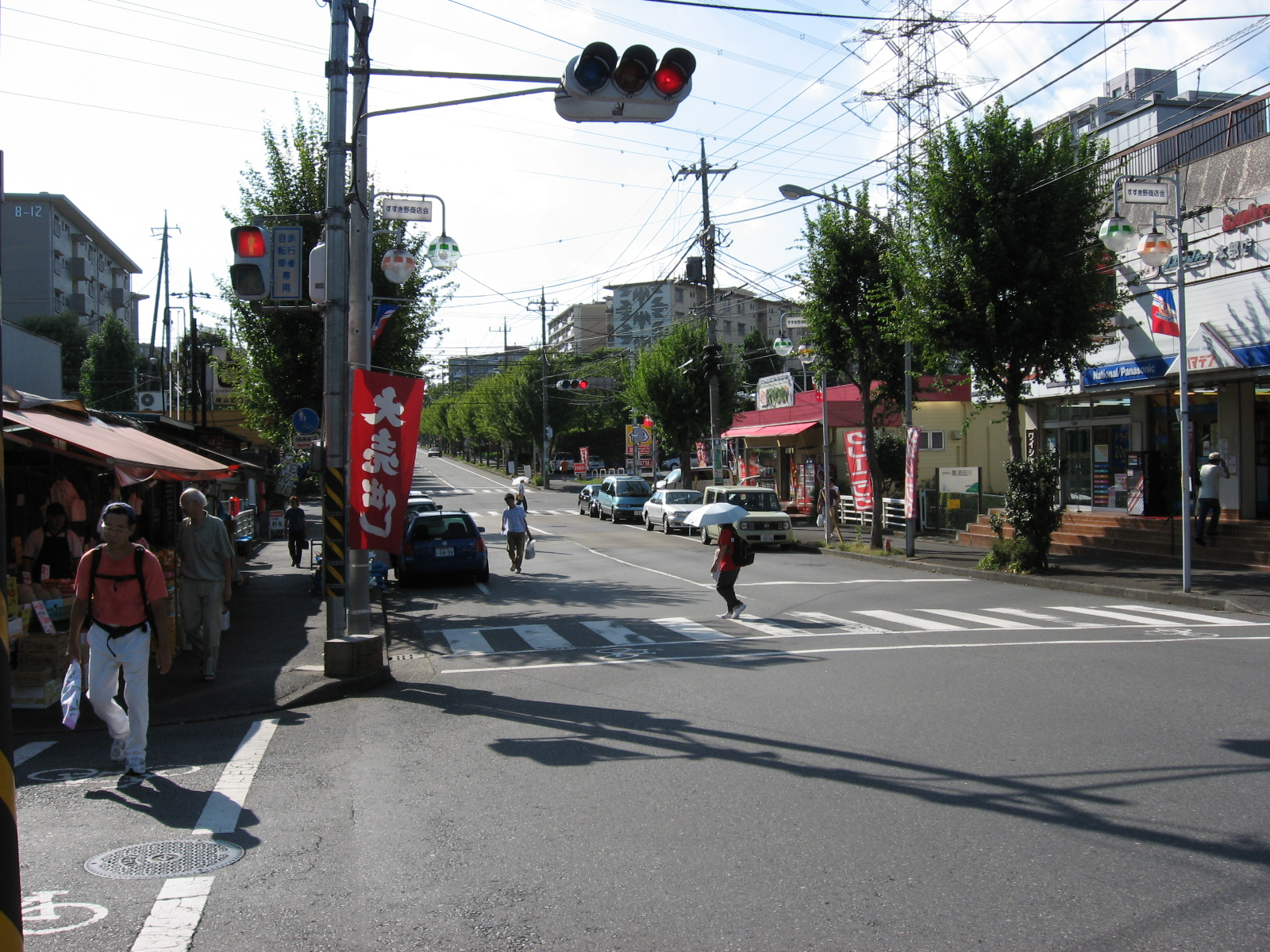 すすき野の商店街